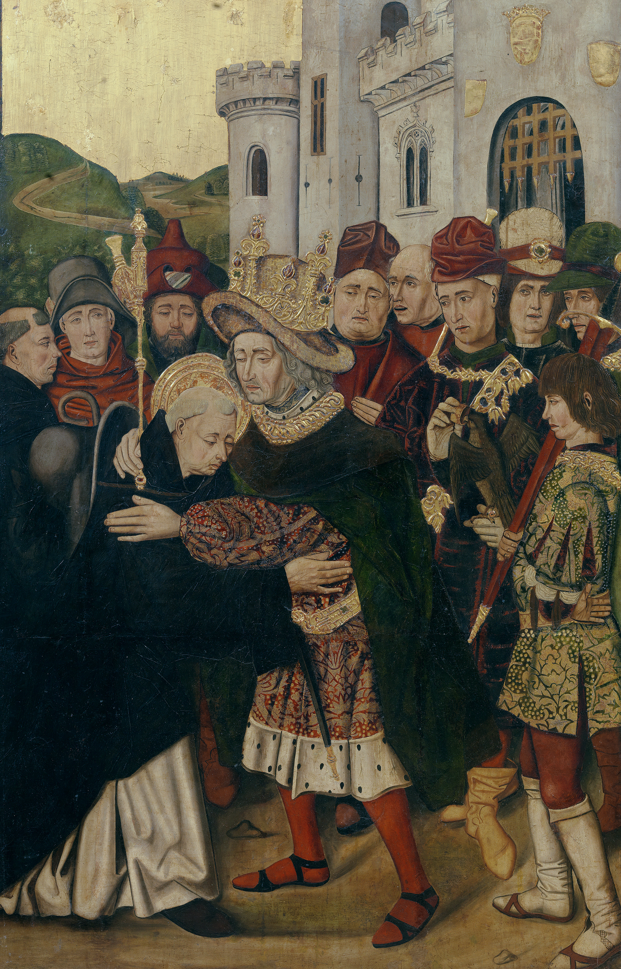 La obra representa al rey Fernando I de León, que aparece junto a sus cortesanos, acogiendo a Santo Domingo de Silos, que había escapado del monasterio de San Millán de Suso tras enfrentarse con el rey García Sánchez III de Pamplona, hermano del propio monarca leonés. Y cuando llegó a Castilla y fue recibido por el monarca leonés a las puertas de la ciudad de Burgos, el soberano nombró al santo abad del monasterio que posteriormente llevaría su nombre.